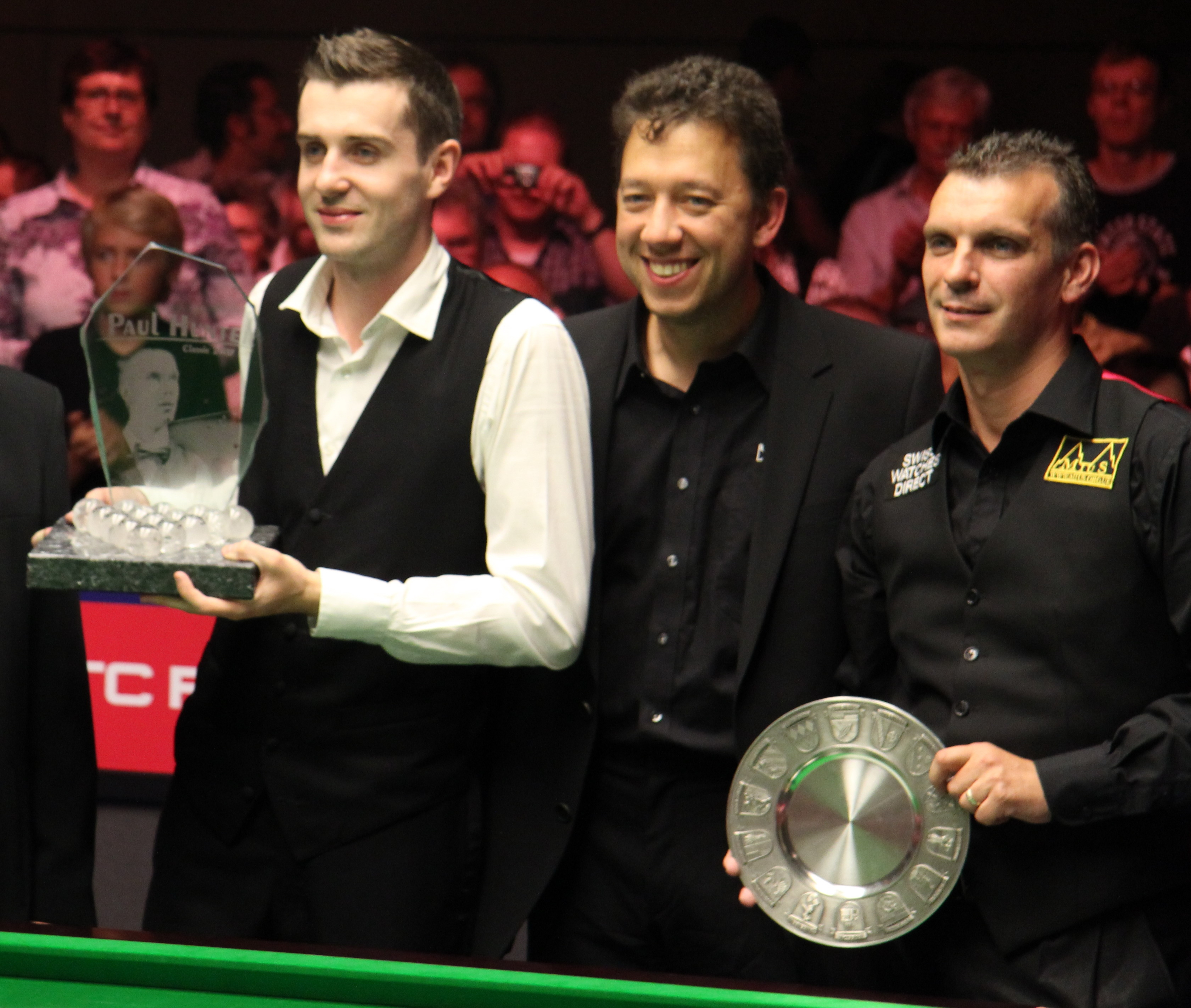 Siegerfoto des Paul Hunter Classic 2011, von links: Sieger Mark Selby, Veranstalter Thomas Cesal, Zweitplatzierte Mark Davis